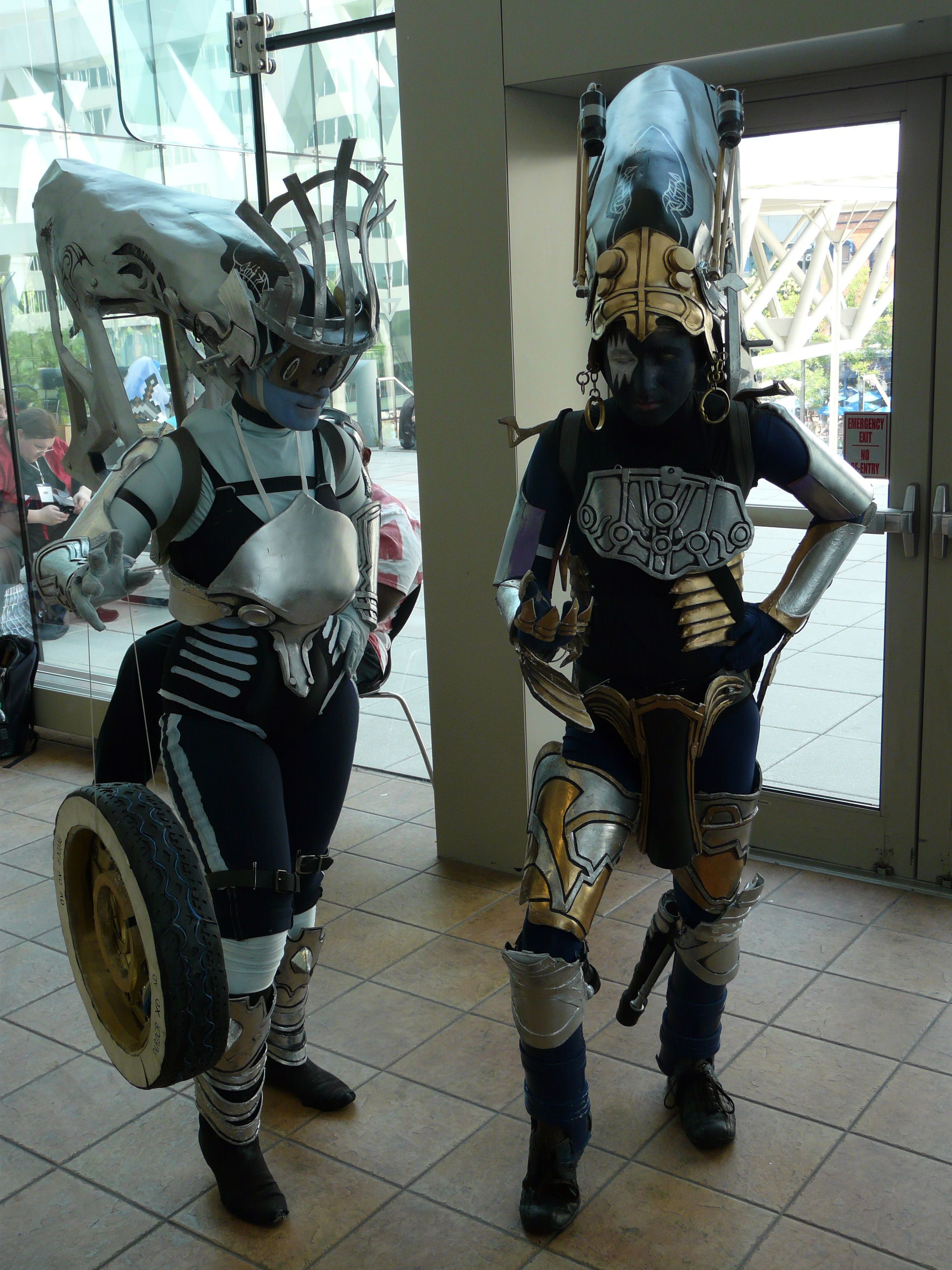 Otakon 2012 cosplay